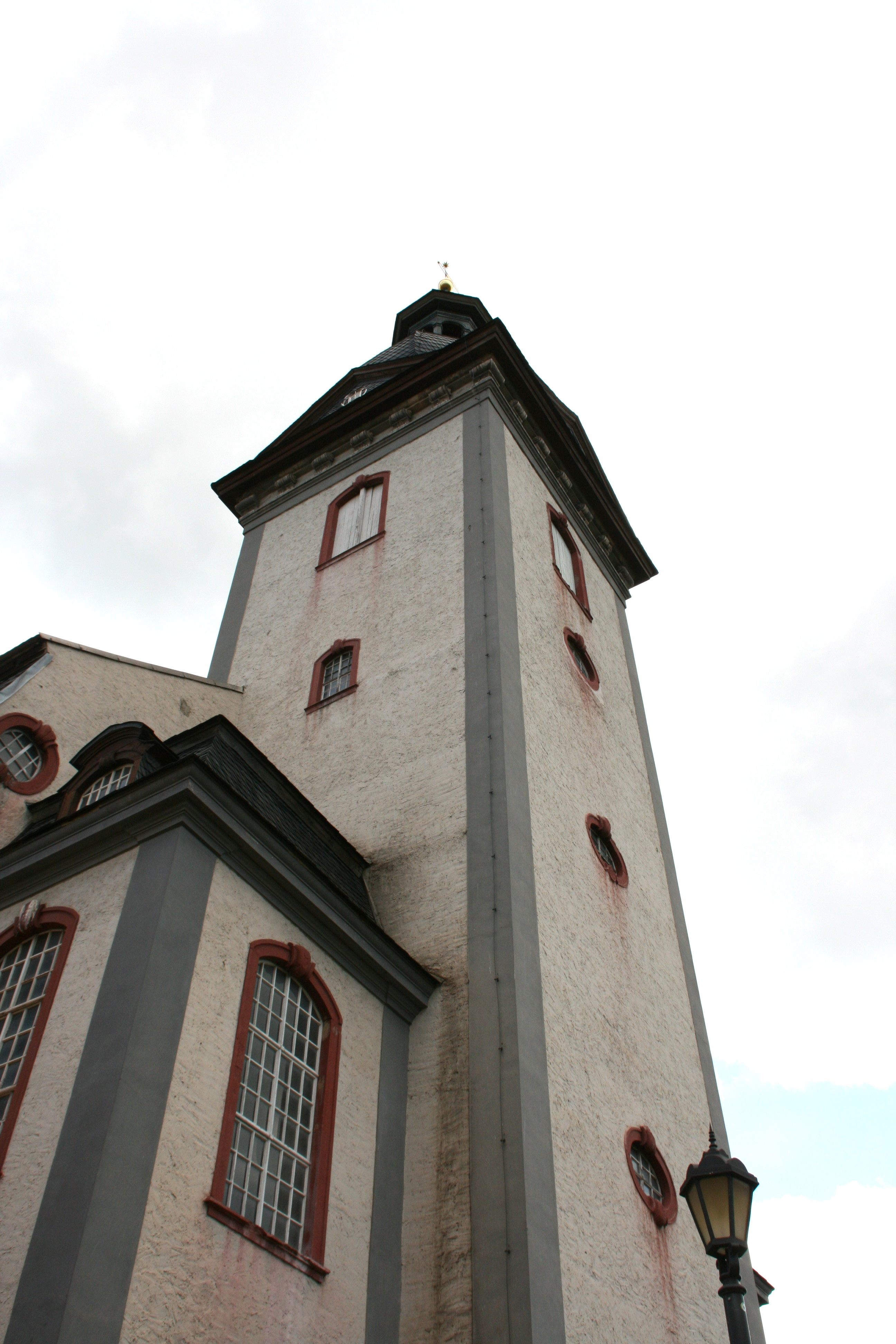 Evangelische Kirche, Kirchplatz in Allstedt